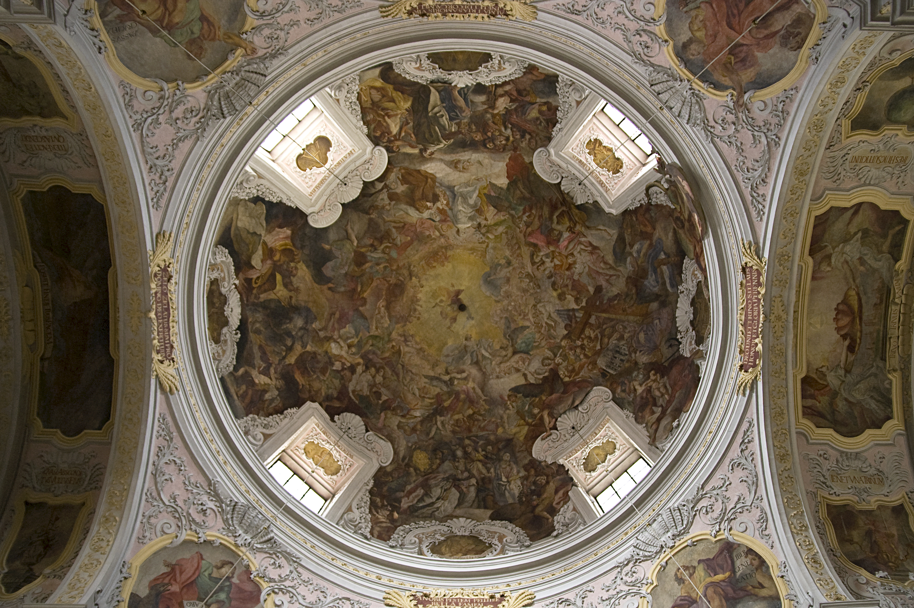 Dreifaltigkeitskirche - Blick zur Kuppel - München. Die katholische Dreifaltigkeitskirche ist eine Votivkirche der Münchner Stände und wurde im Stil des bayerischen Barock nach Plänen von Giovanni Antonio Viscardi 1711 bis 1718 erbaut. Fresken von Cosmas Damian Asam.